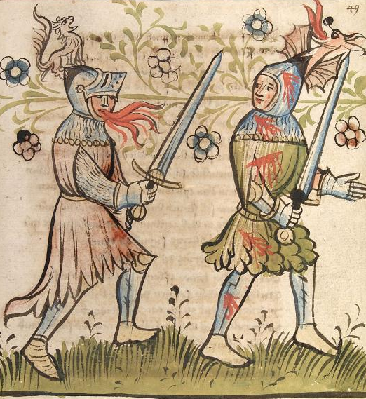 Zweikampf zwischen Dietrich und Siegfried, Cod. Pal. germ. 359 Der Rosengartt vnd Lucidarius, von allen frembden Landen, Reymen weiß auf Papir geschrieben (auch Der Rosengart vnd Lucidarius, Die Gedichte vom Rosengarten zu Worms oder Der deutsche „Lucidarius“), Universitätsbibliothek Heidelberg